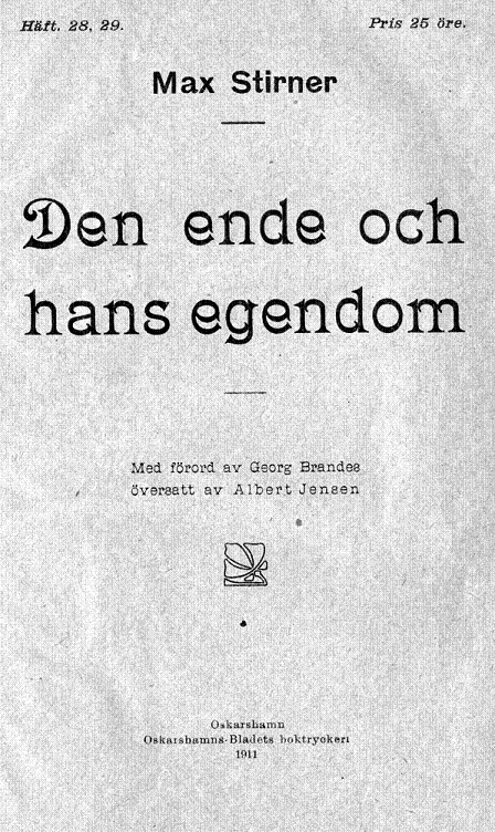 Portada de la traducción sueca de Der Einzige und sein Eigentum, 1911